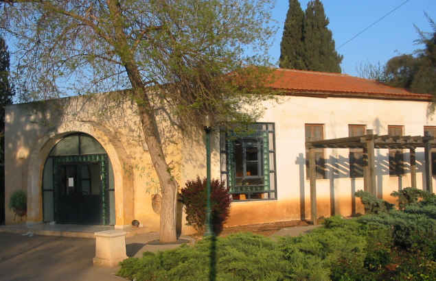 Yesod HaMa'ala synagogue